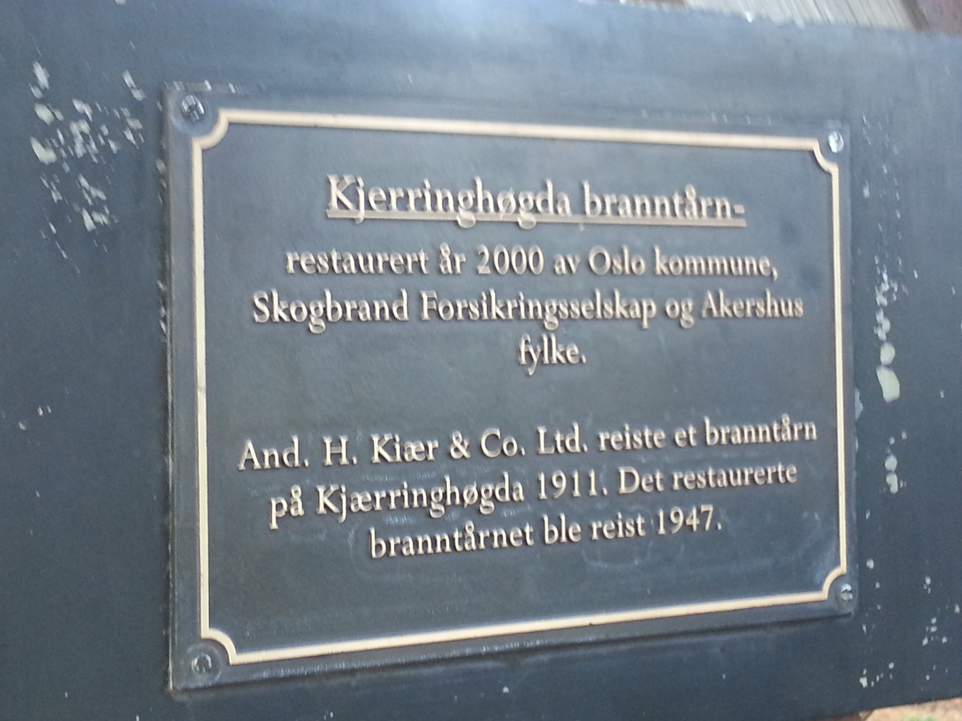 Skilt på foten av utsiktstårnet.